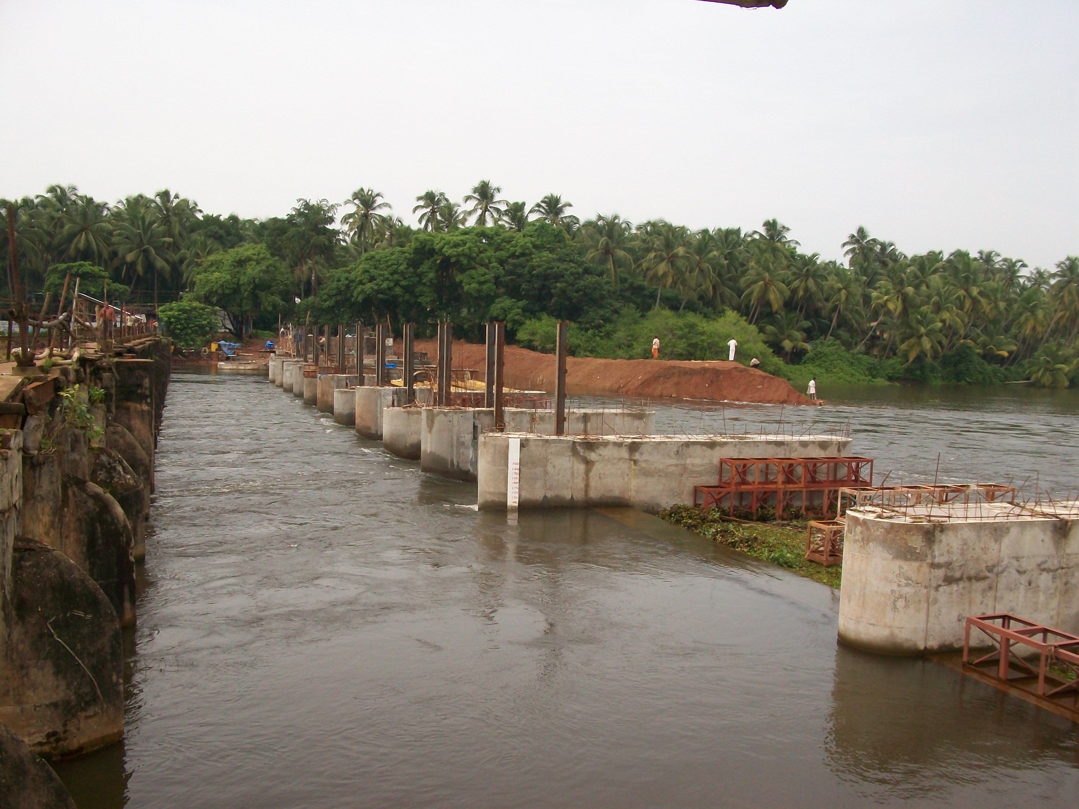 നിർമ്മാണം നടന്നുകൊണ്ടിരിക്കുന്ന ബിയ്യം റഗുലേറ്റർ കം ബ്രിഡ്ജ്